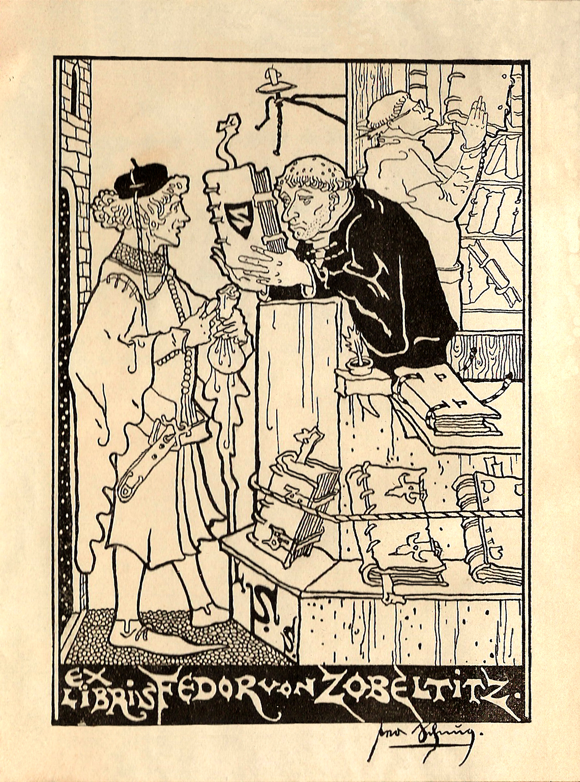 Exlibis Fedor von Zobeltitz